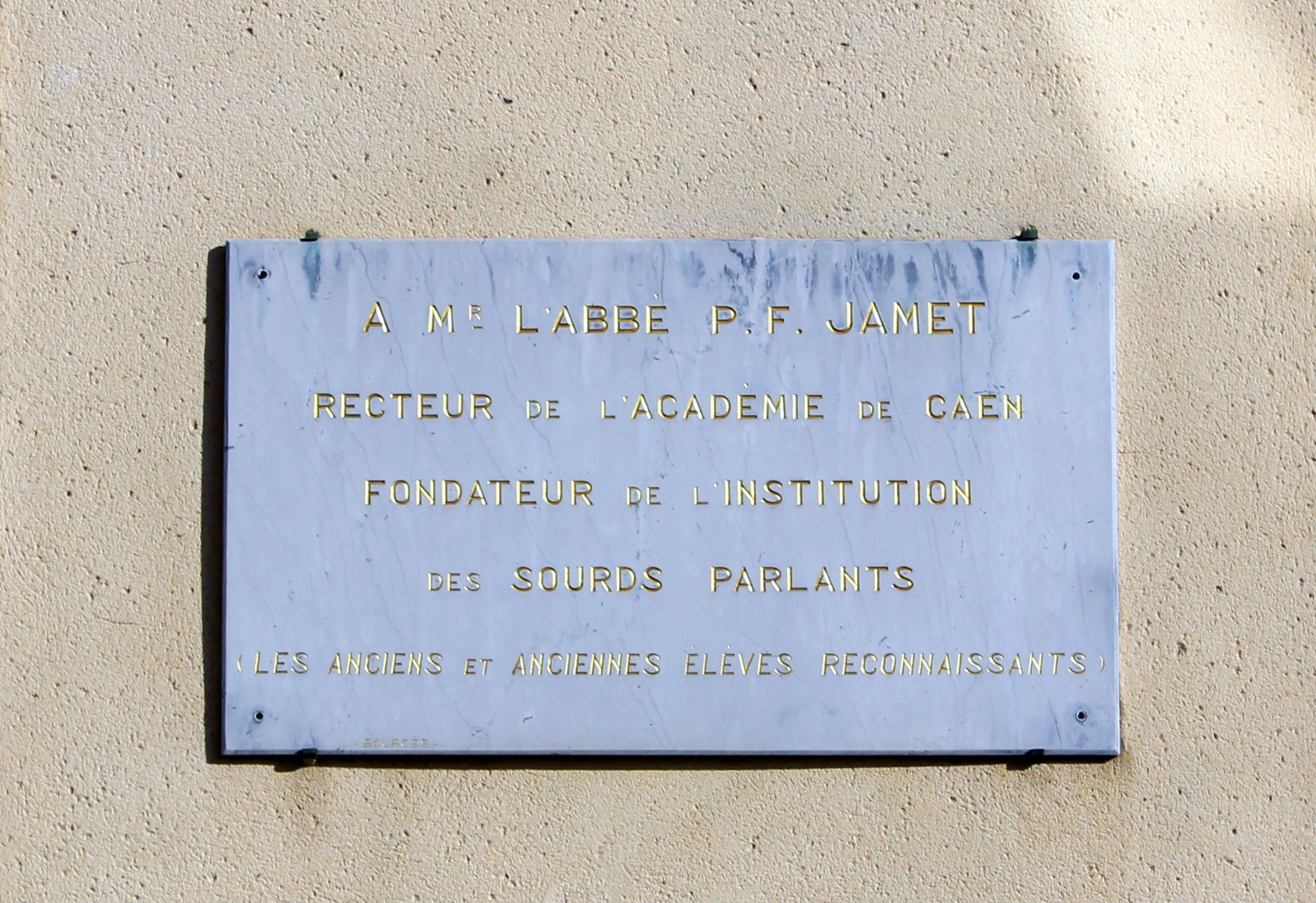 Plaque au 93 rue Caponière sur la façade du Bon sauveur à Caen (Calvados). A Mr l'abbé P. F. Jamet, recteur de l'Académie de Caen, fondateur de l'institution des sourds parlants (les anciens et anciennes élèves reconnaissants).